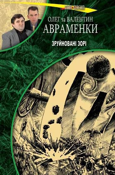 Обкладинка книги "Зруйновані зорі" О.Авраменко